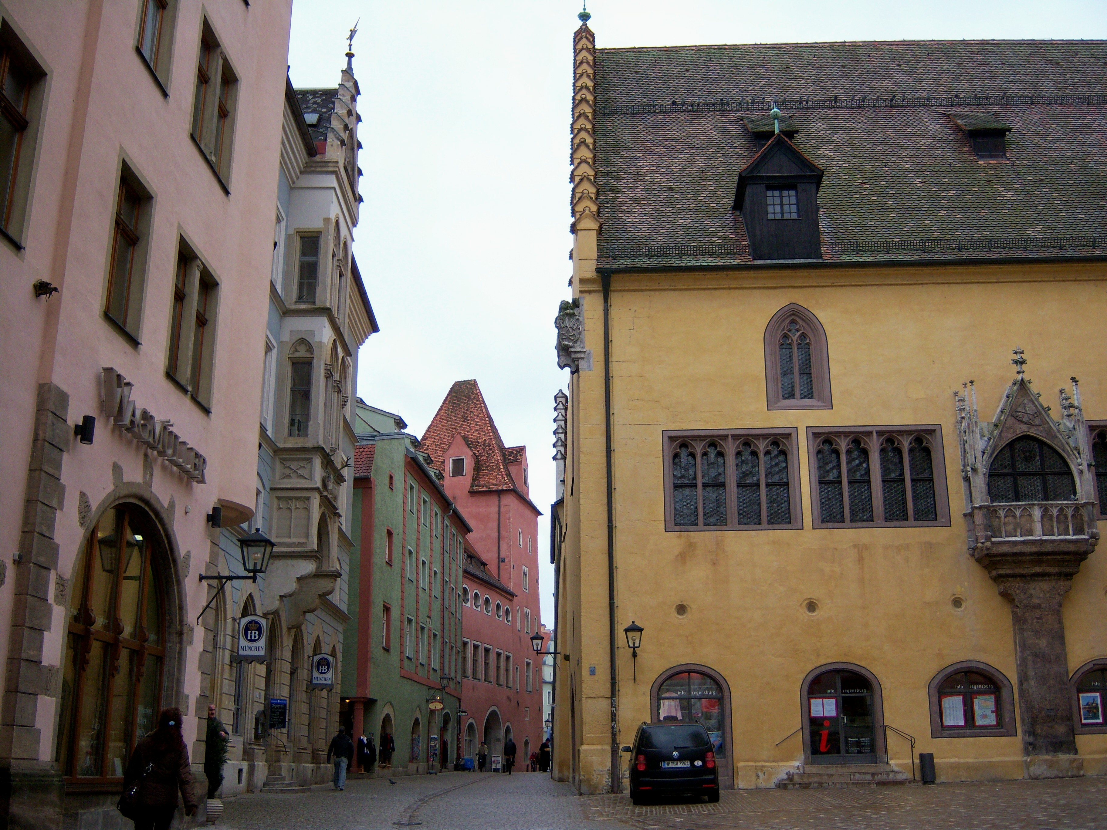 Regensburg, Kohlenmarkt with Town Hall